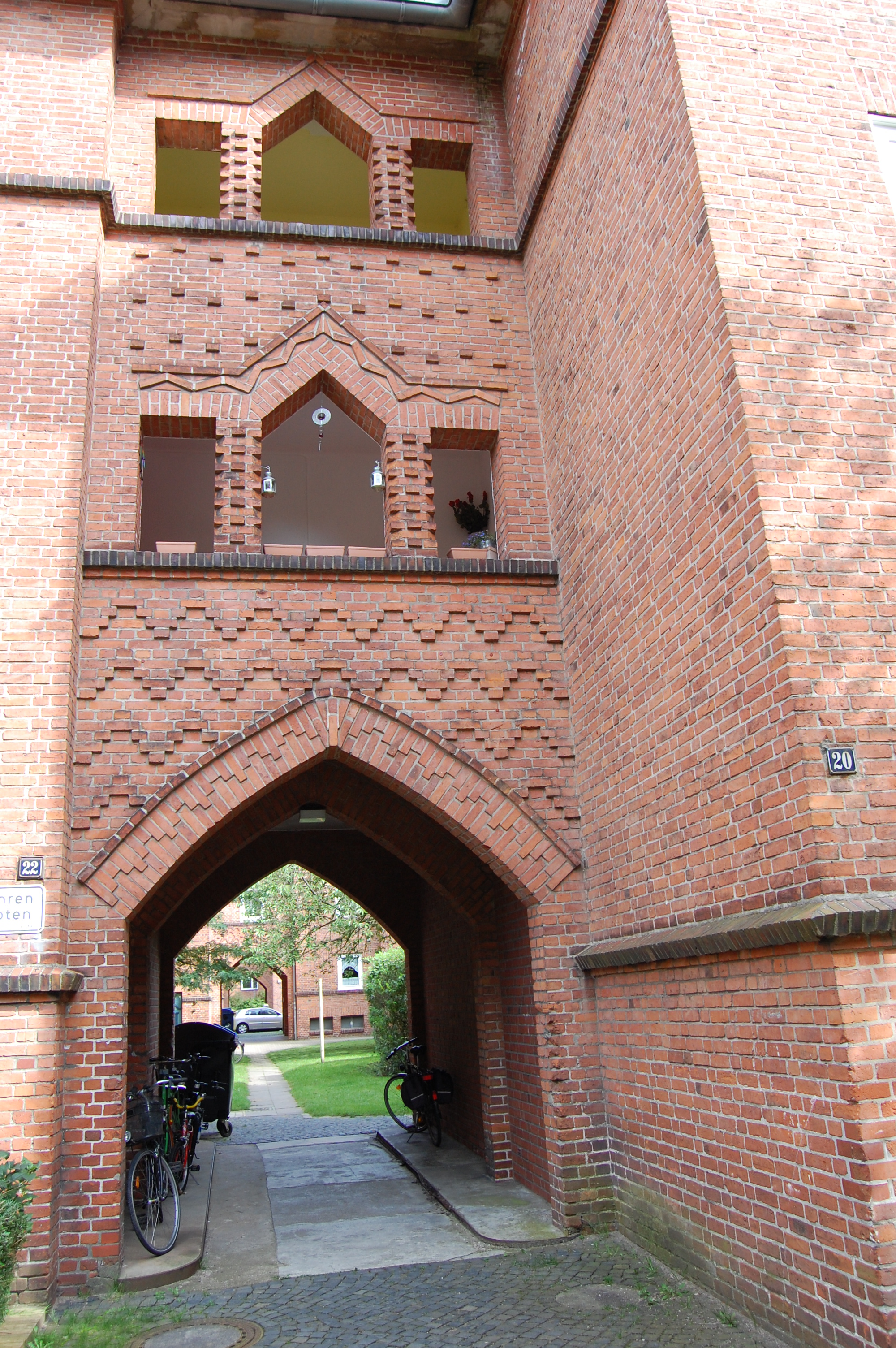 Marineviertel